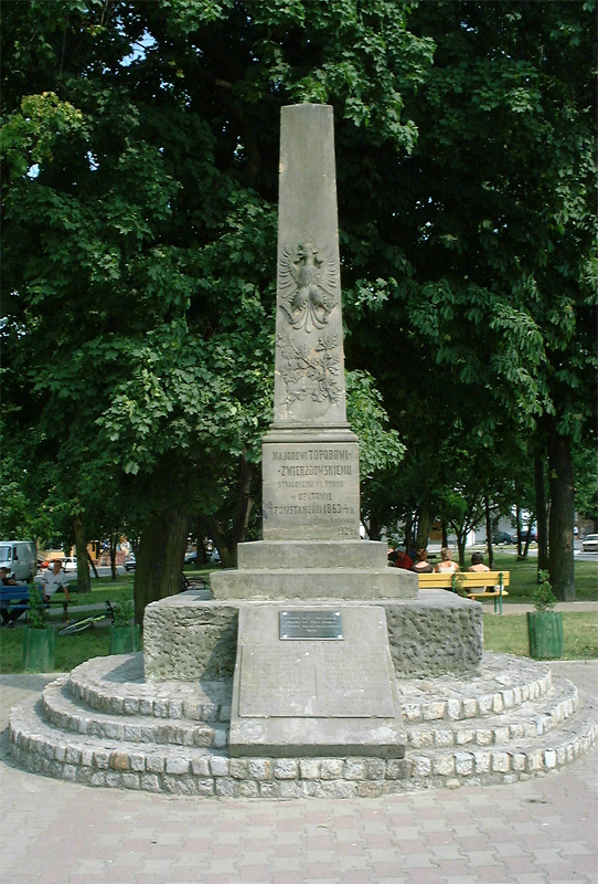 Opatów, Plac Obrońców Pokoju - Pomnik majora Ludwika Zwierzdowskiego, 1924